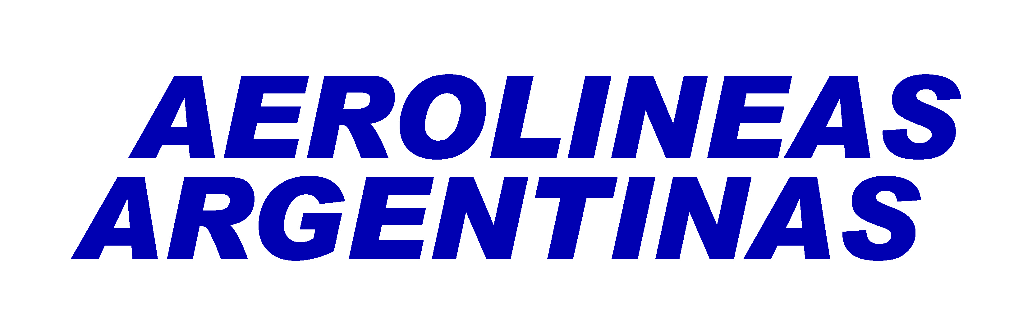 Logo tipo de Aerolineas Argentinas que utilizo hasta el 9 de junio de 2010